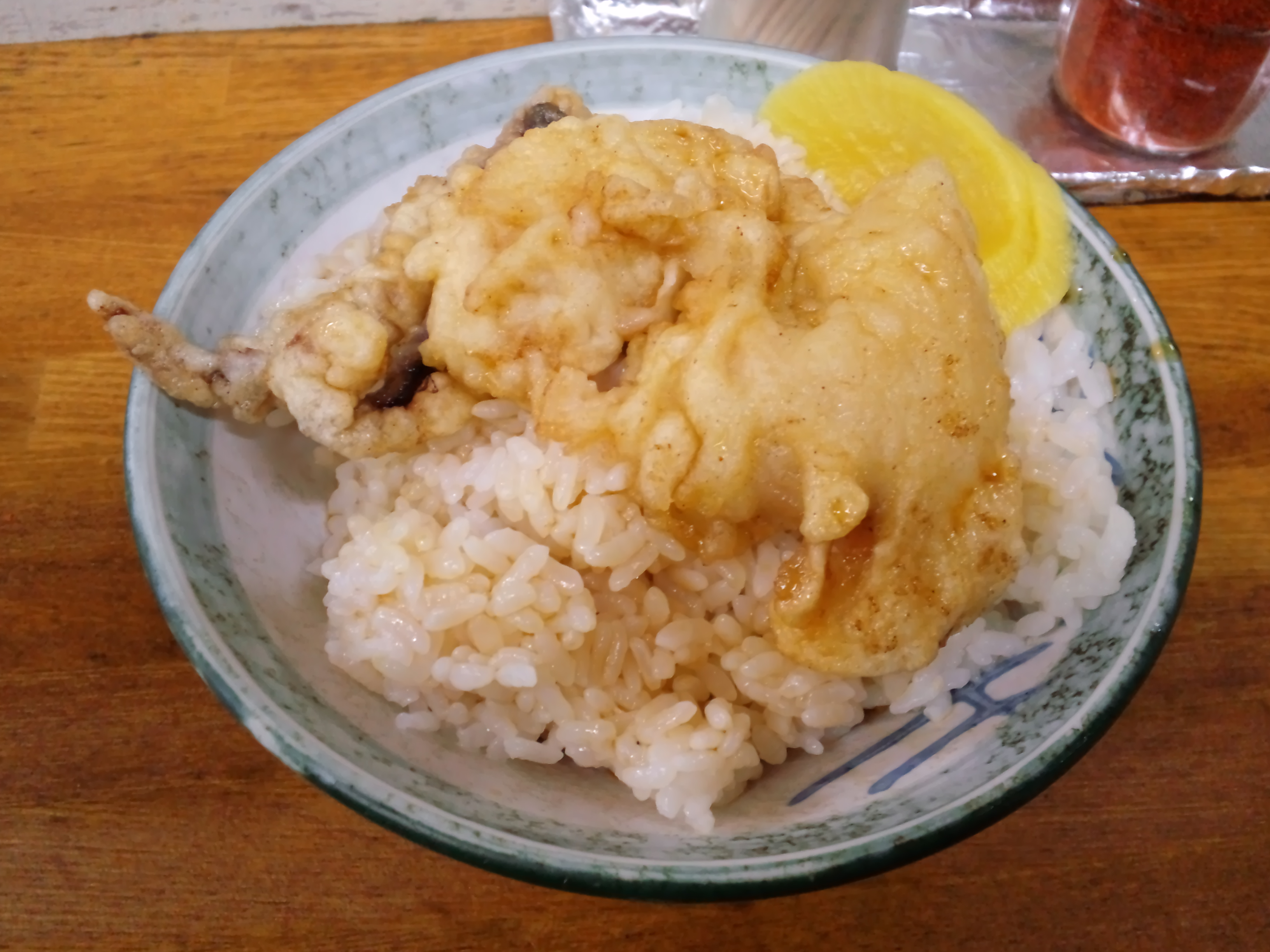 小もろ蕎麦店のゲソ丼